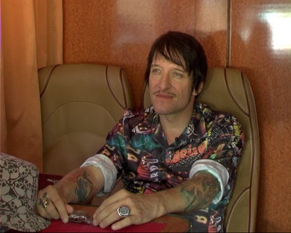 Bela B. im Tourbus